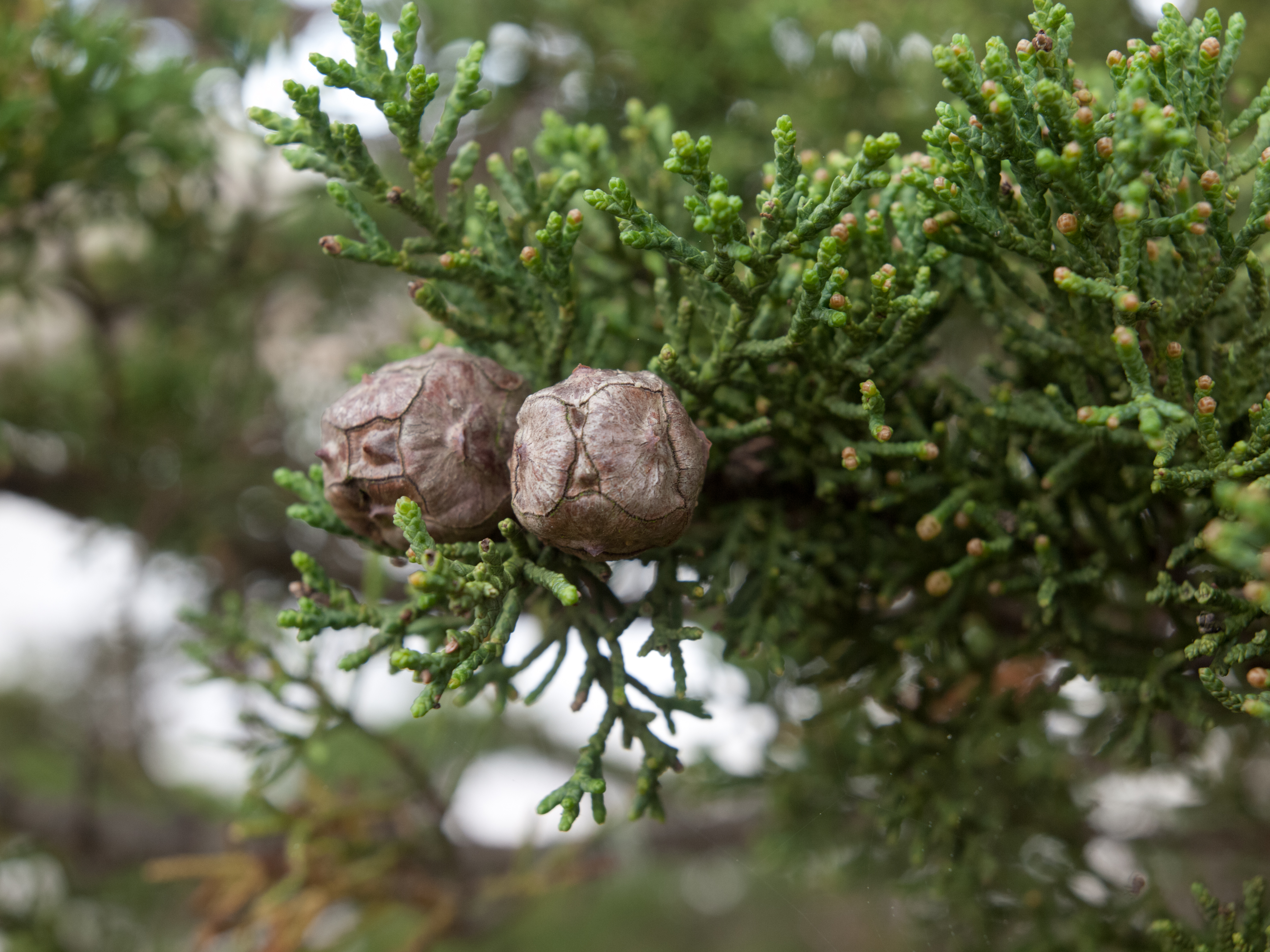 Cupressus macrocarpa cones